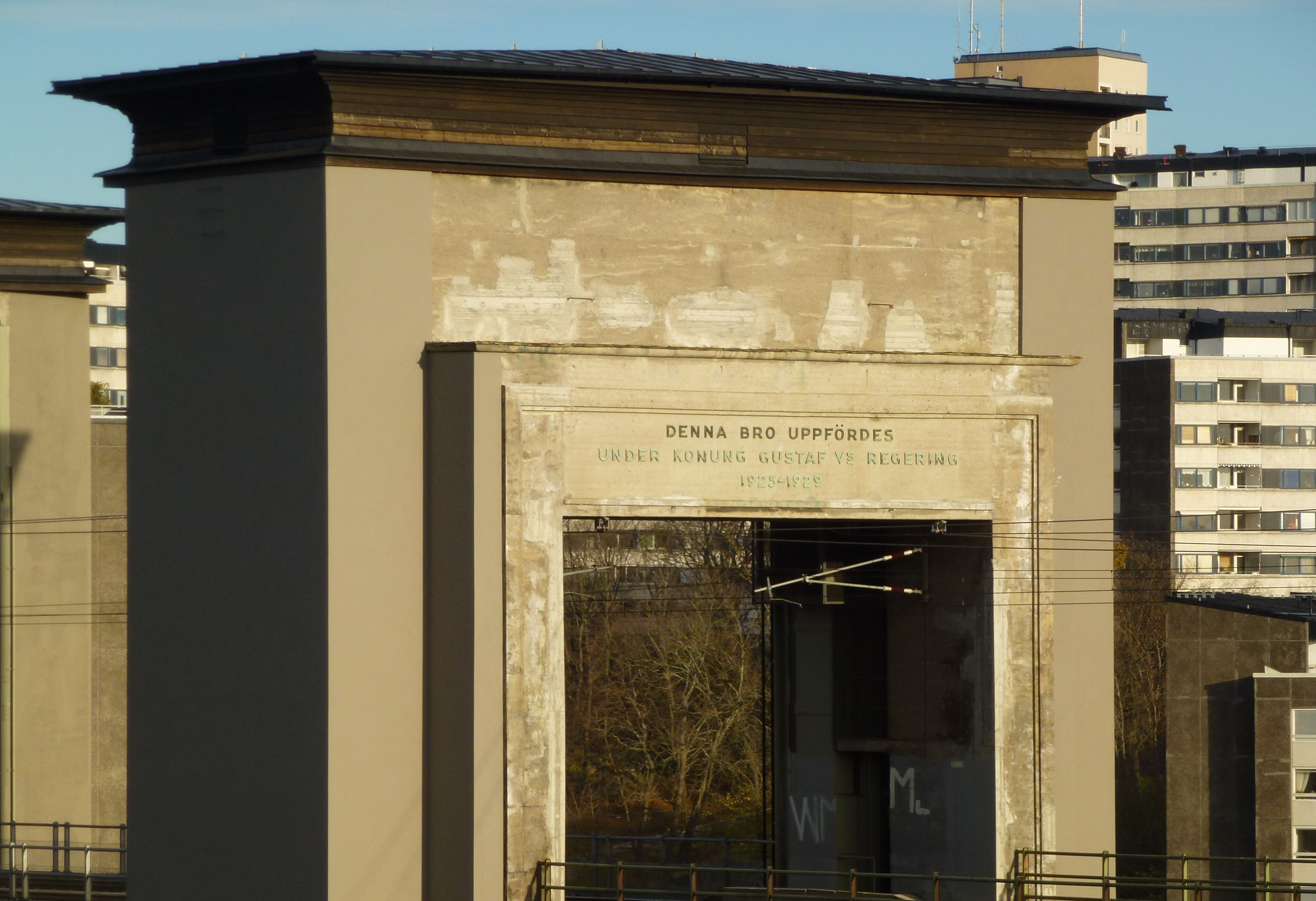 Årstabron (östra) i Stockholm, södra tornet, detalj